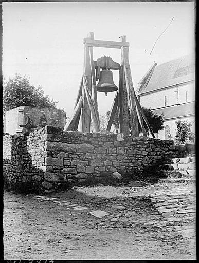 Puits en pierre avec cloche à Daoulas en 1892 (photo de Lucien Roy, Société Française d'Archéologie ; Ministère de la Culture (France) - Médiathèque de l'architecture et du patrimoine)